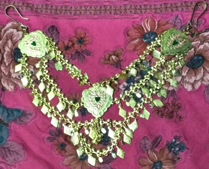 मेखला